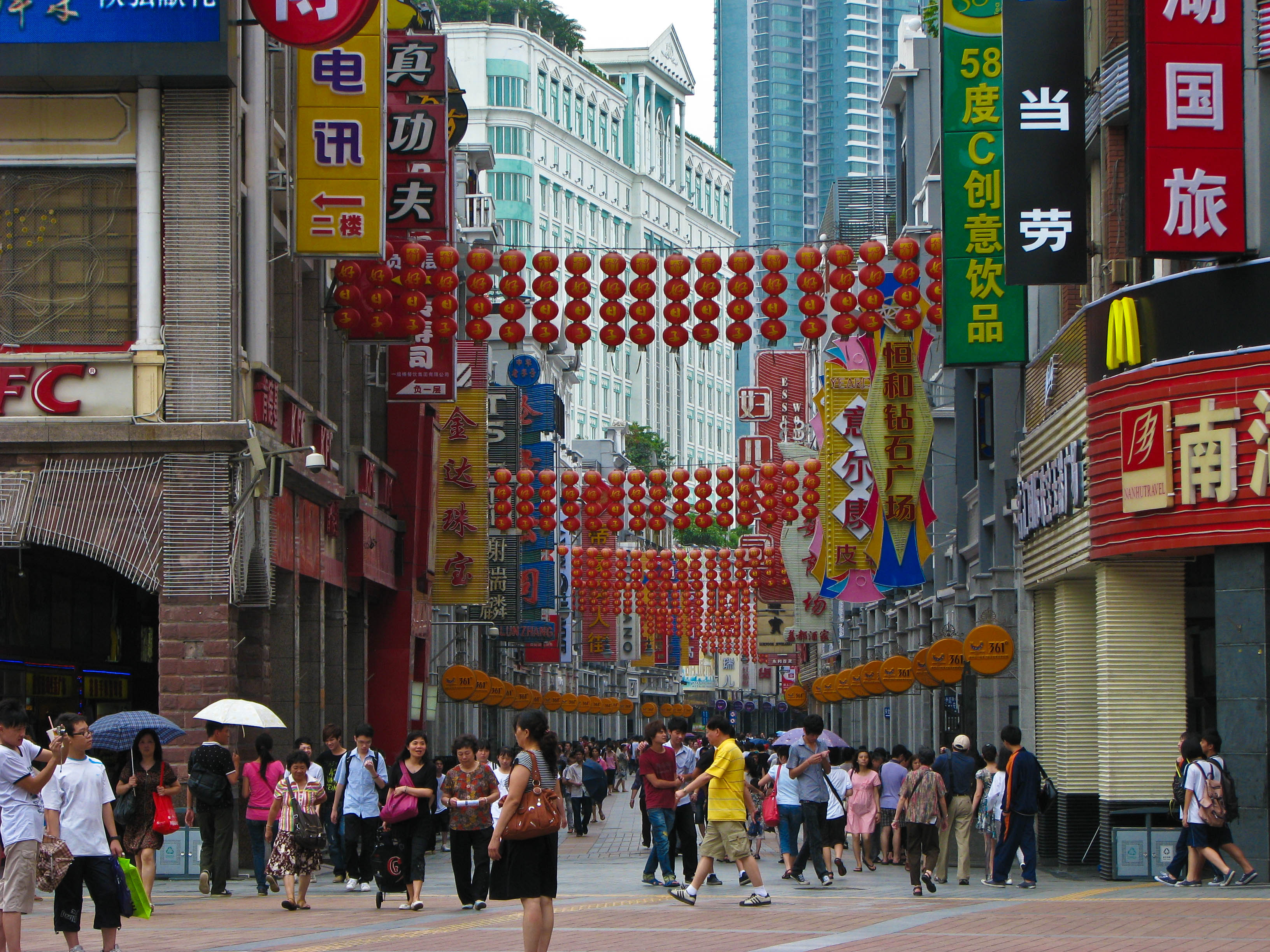 Shangxia Lu, Guangzhou